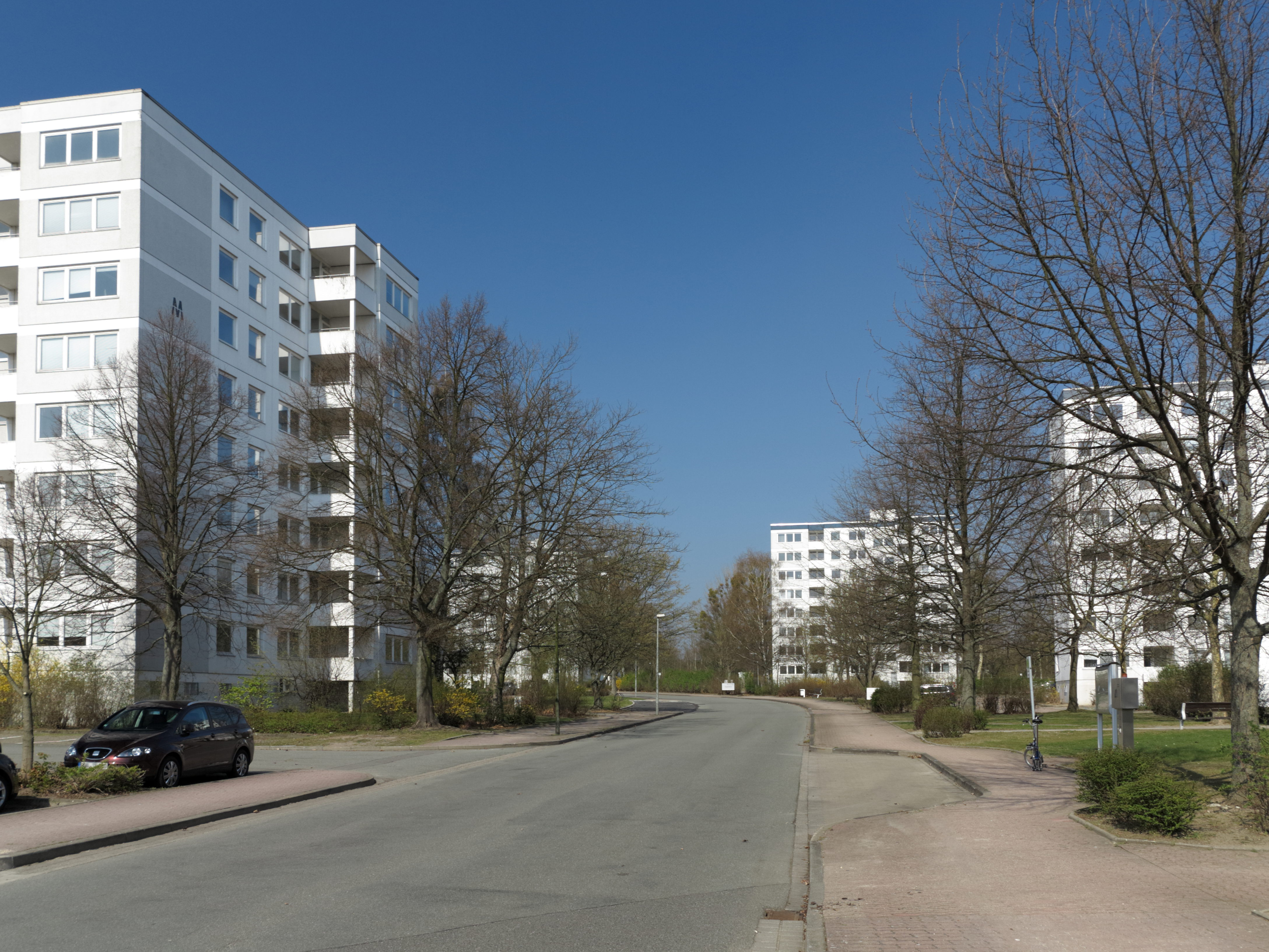 Wolfsburg-Kästorf, Büro Zentrum Nord der Volkswagen AG. Oebisfelder Straße.